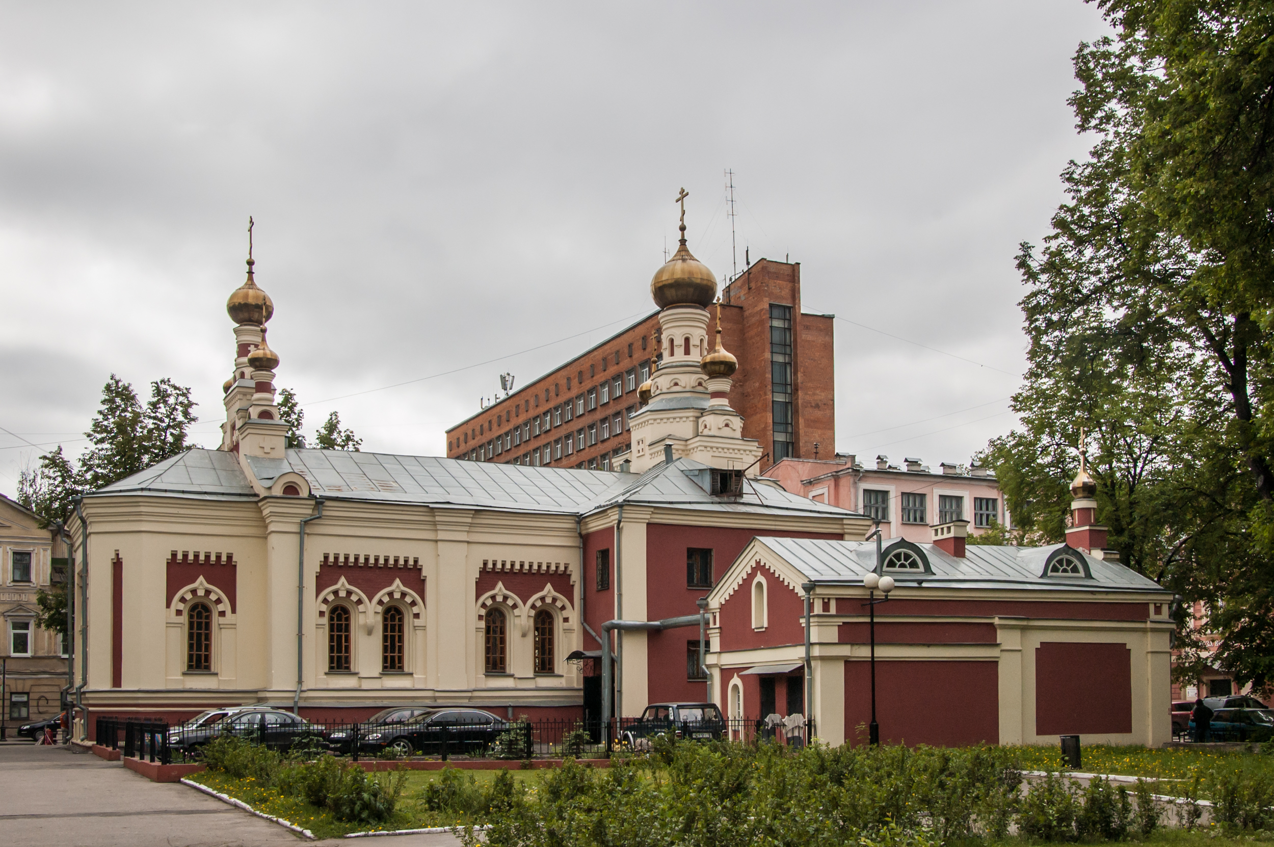 Церковь Всех скорбящих радость иконы Божией Матери: улица Нестерова, 2, Нижний Новгород, Нижегородская область